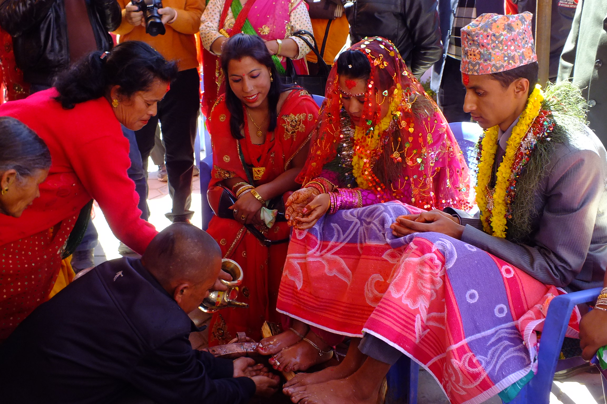 2015-3 Budhanilkantha,Nepal-Wedding ブダニールカンタ寺院付近でのヒンズー結婚式